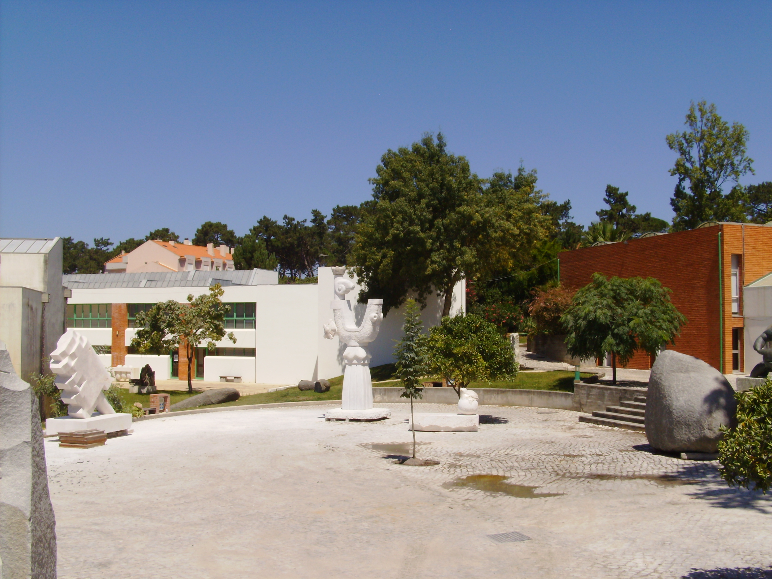 Centro de Artes, Caldas da Rainha, Distrito de Leiria, Portugal: Espaços Ar-Livre.